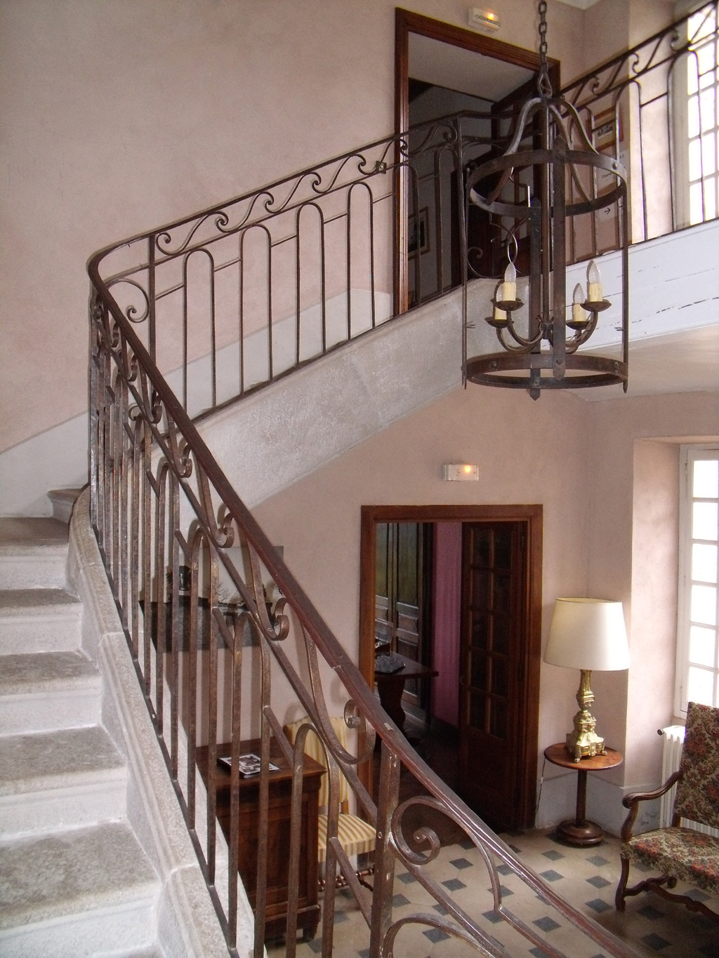 Château de Goutelas (commune de Marcoux) : escalier d'honneur dans le vestibule d'entrée, attribué à Michel Dal Gabbio (entre 1777 et 1779). Escalier tournant à retour, avec jour et rampe en fer forgé.